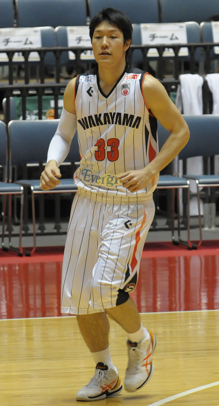 和歌山トライアンス、内海慎吾選手。代々木第一体育館で。